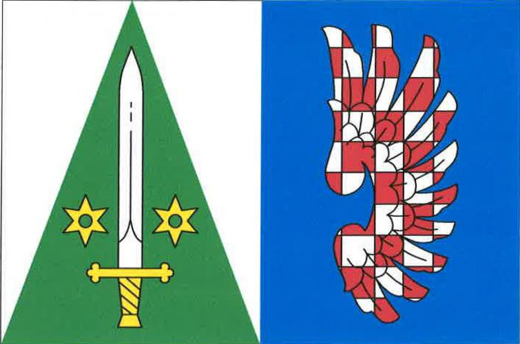 Velemín vlajka